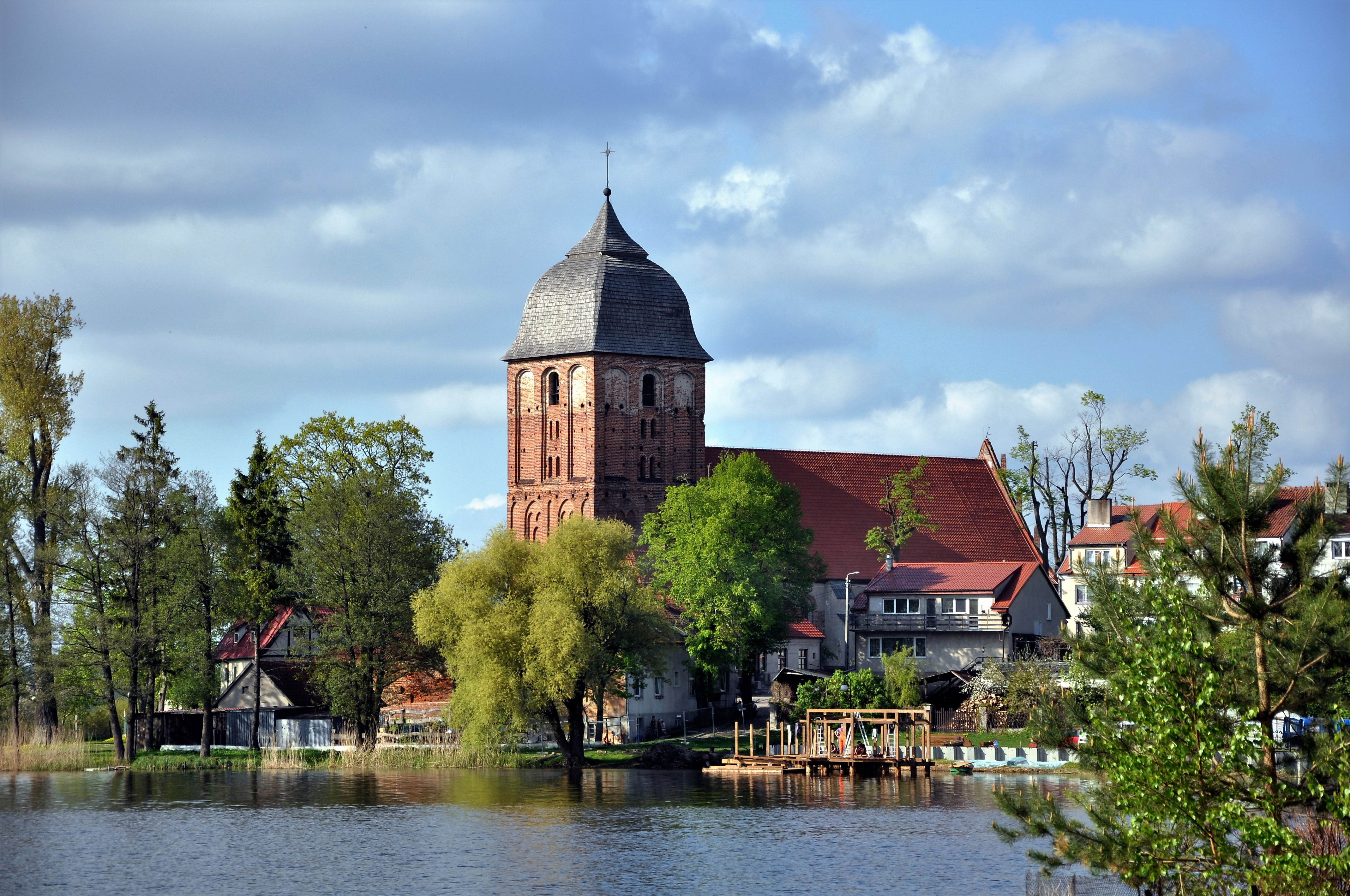 Pasym, kościół ewangelicki, XV/XVI, 1765-1775